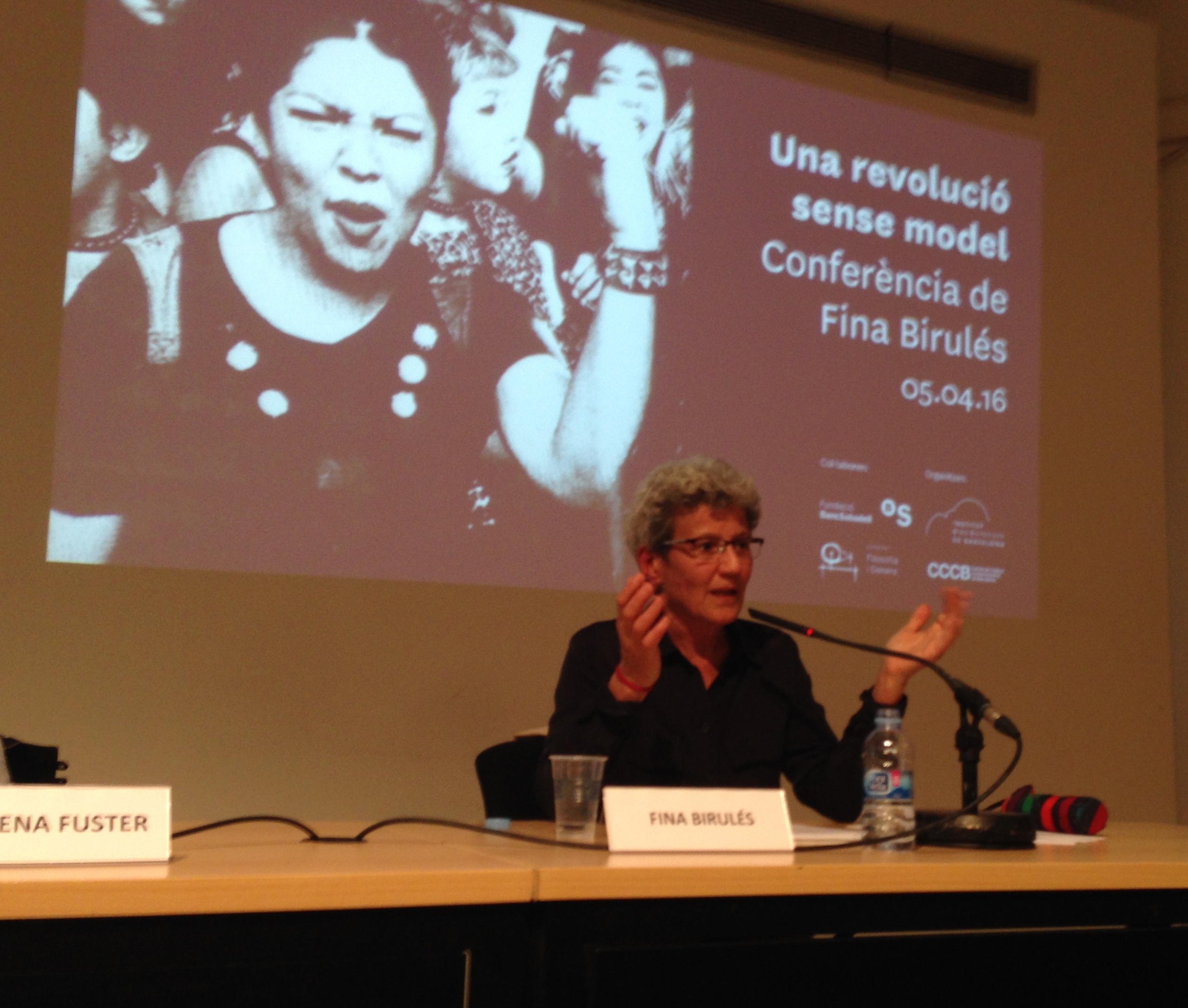 Conferencia "Una revolució sense model. Feminisme i transformació". Barcelona CCCB